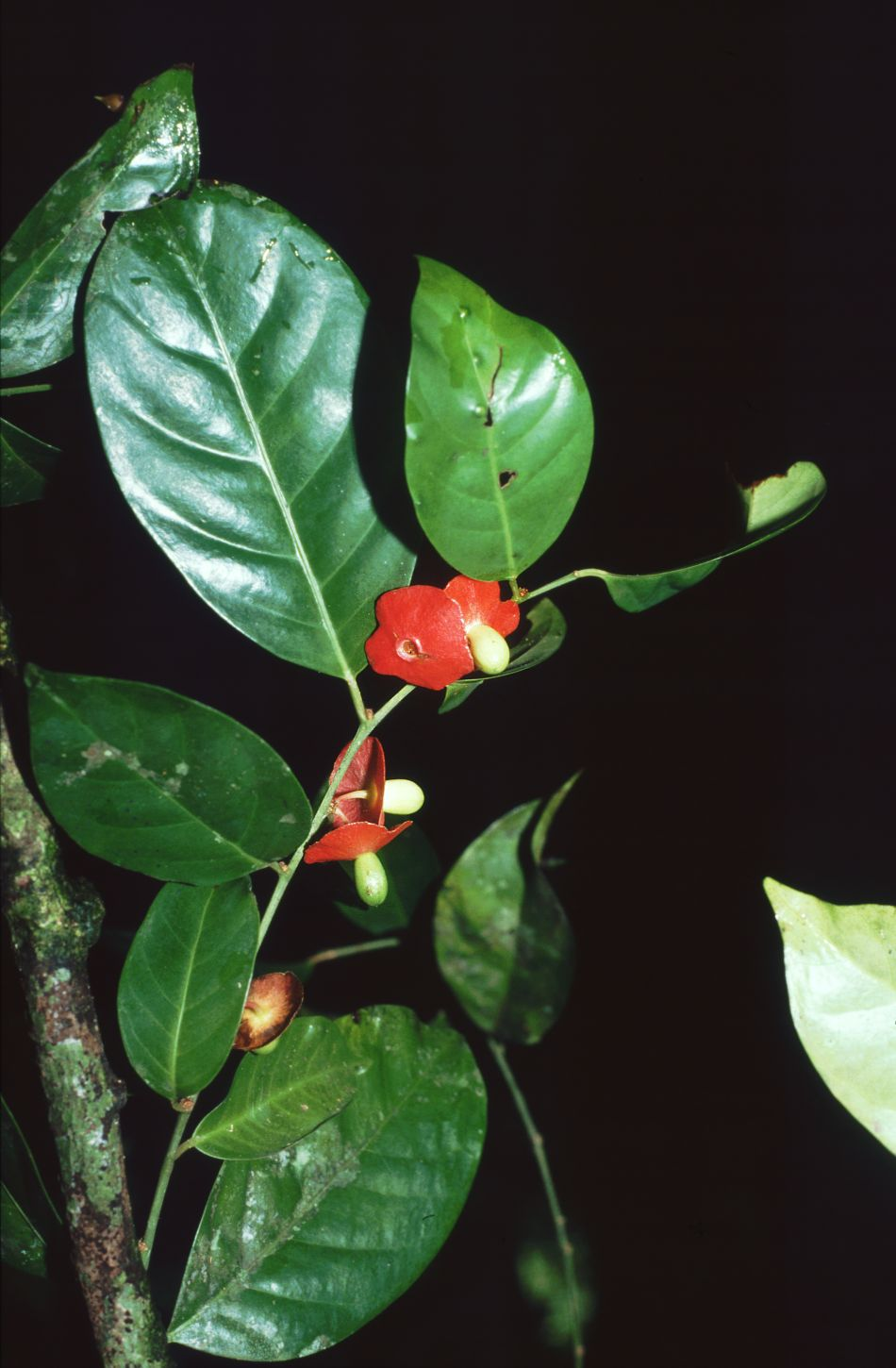 Heisteria acuminata, Erythropalaceae – unreife Früchte/immature fruits – Costa Rica: Prov. Puntarenas, PN Piedras Blancas, Bosque Esquinas bei La Gamba, "Ocelot Trail"